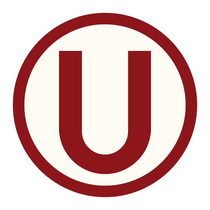 Logo oficial del Club Universitario de Deportes